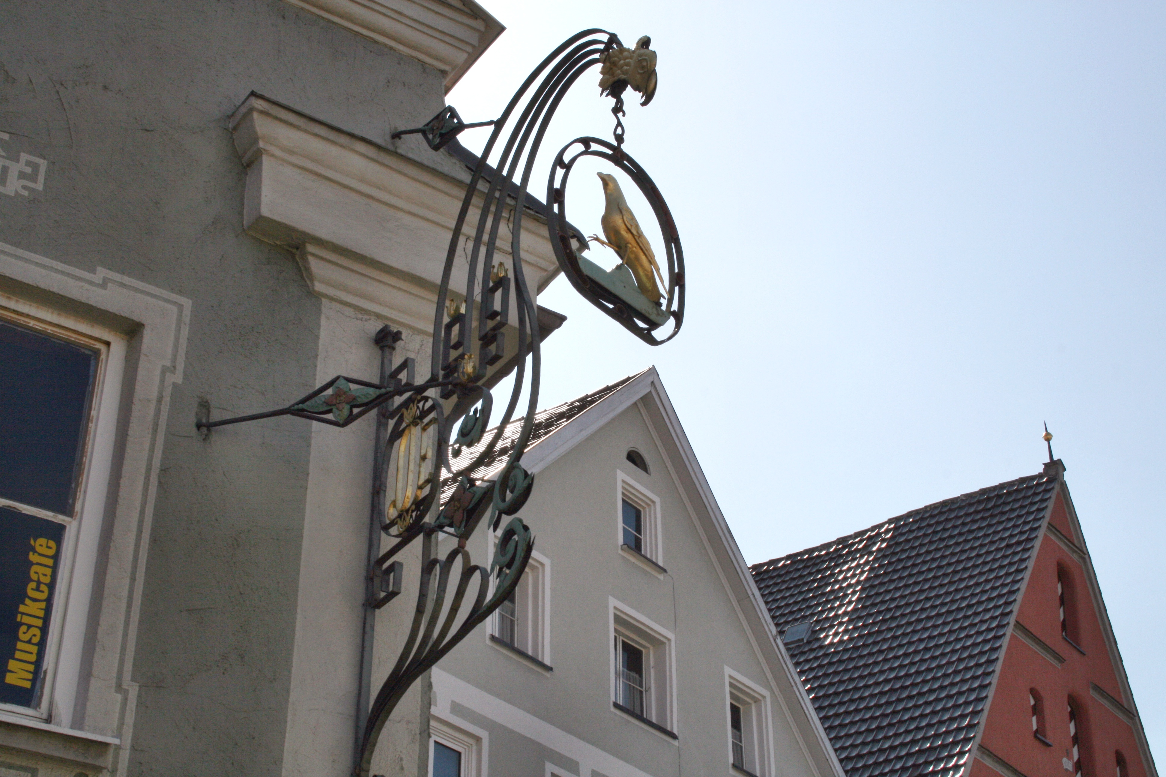 Nasenschild zum Wirtshaus "Raben"